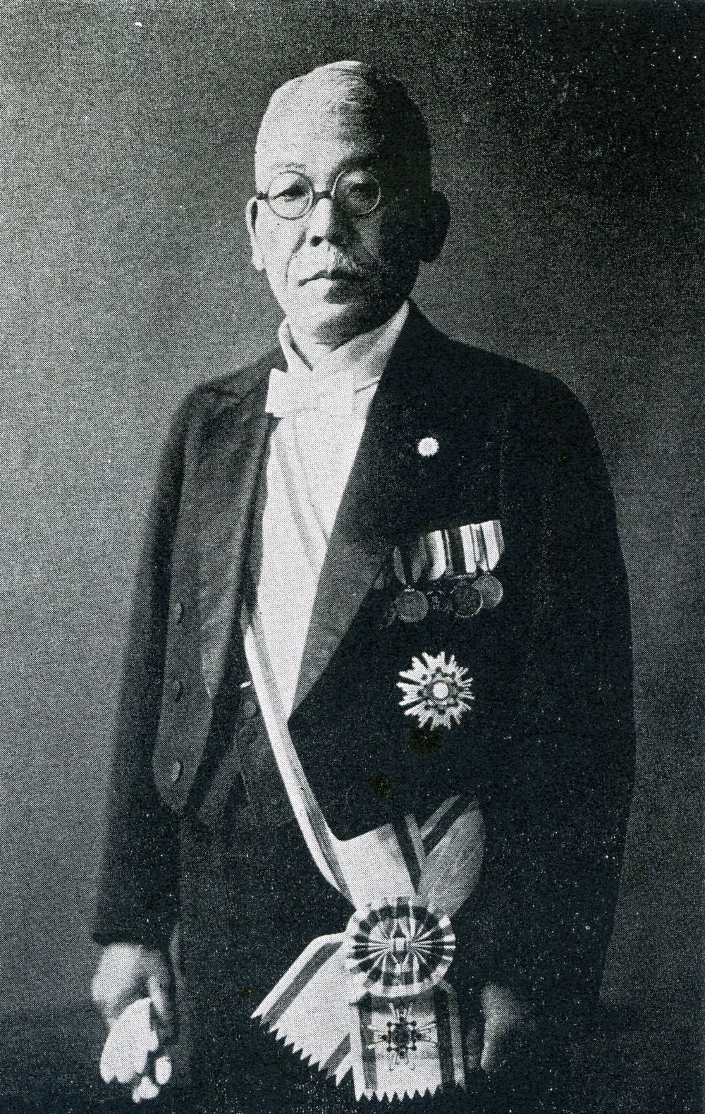 この写真は秋田清(1881-1944)の1942年のものです。